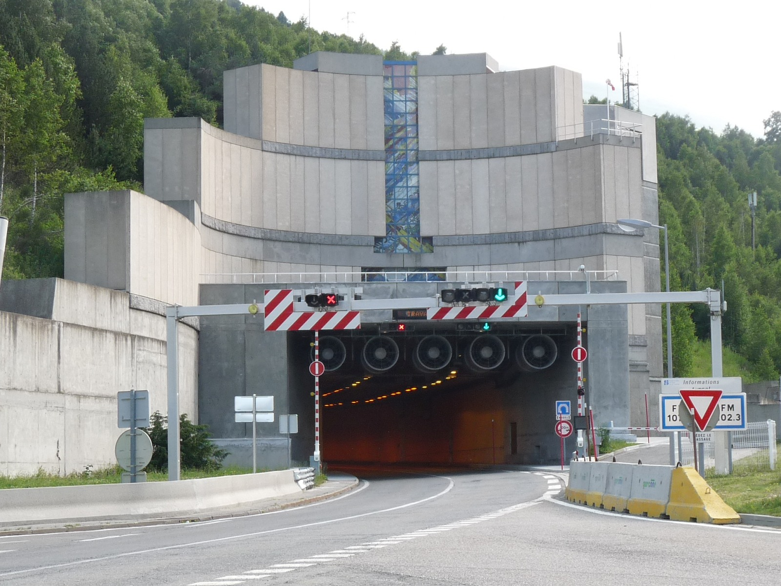 Entrée nord du tunnel routier de Puymorens, Ariège, France